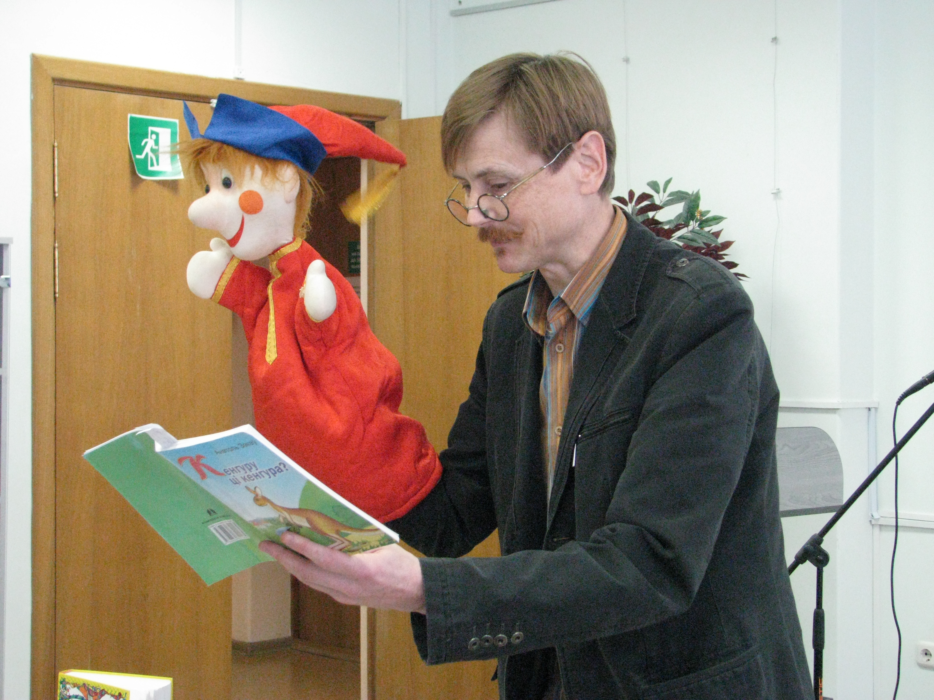 Беларуская (тарашкевіца): Аляксандр Ждановіч (Маляваныч) на Дні роднай мовы. 19.02.2015